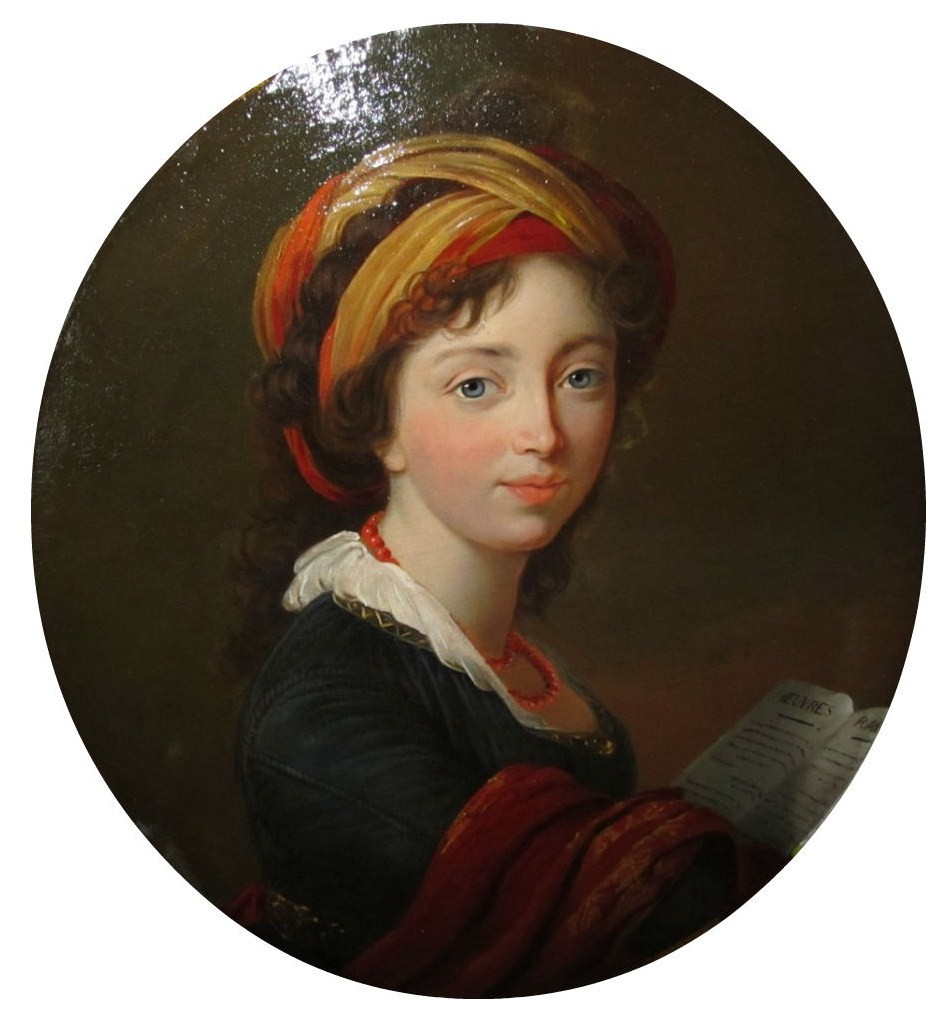 Ирина Ивановна Воронцова, урожденная Измайлова (1768—1848).